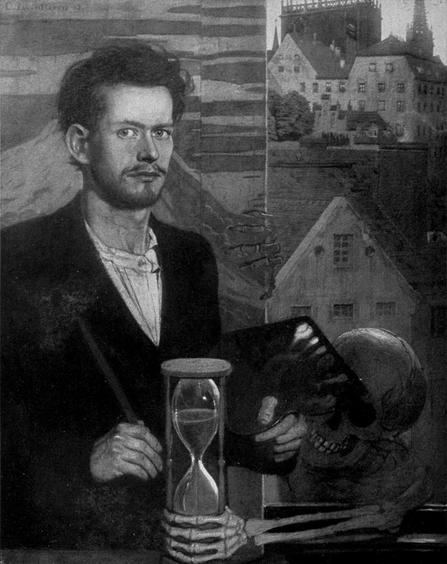 Autoportrait